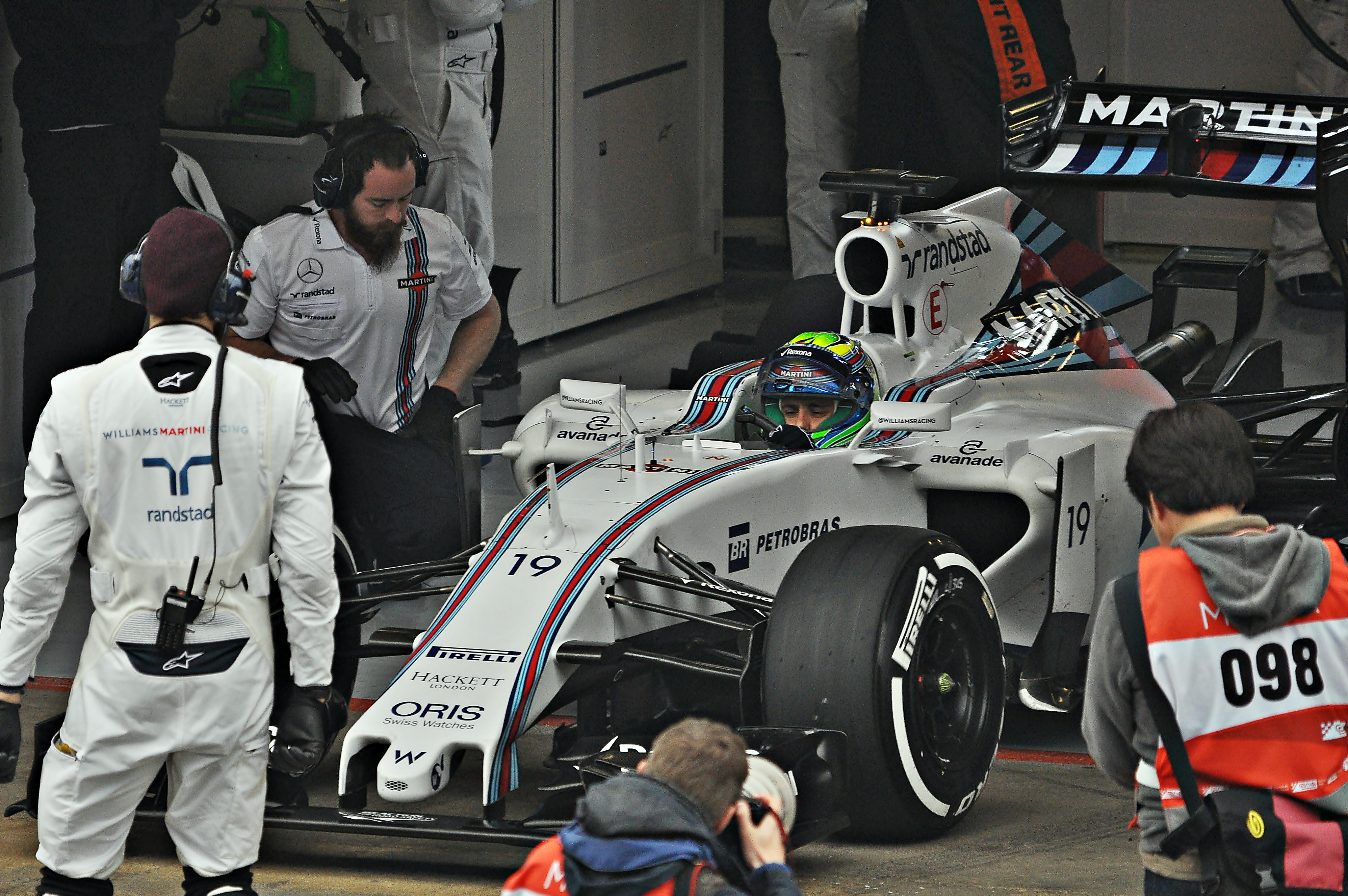 Test days Barcelona 2015